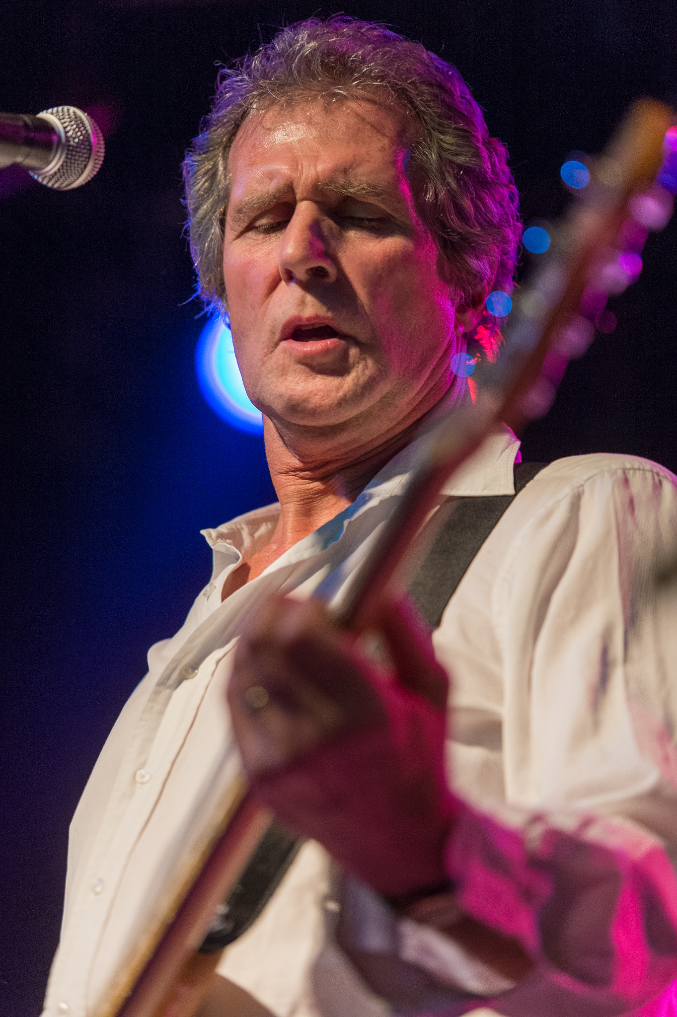 Concertbüro Franken,Der Hirsch,Dire Straits,John Illsley,Konzert,Livekonzert,Livemusik,Musik